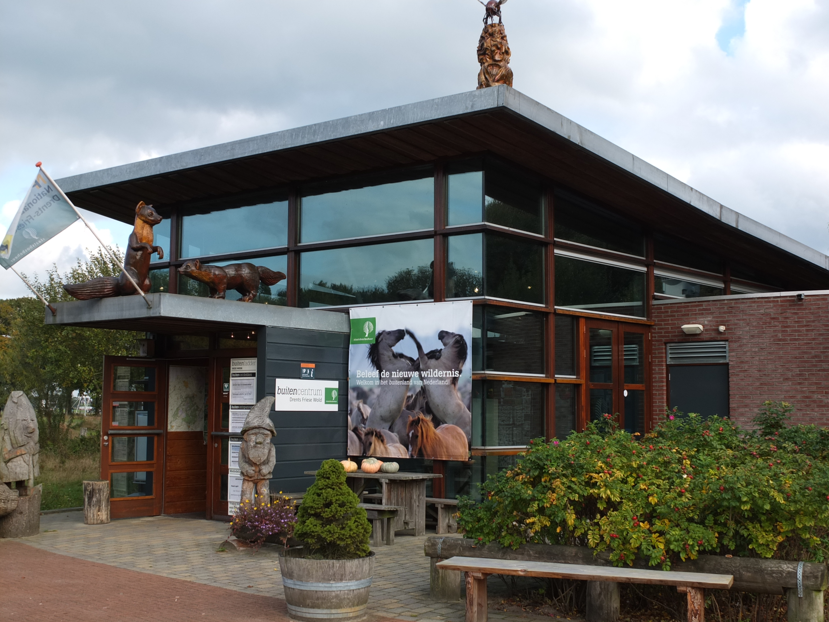 Zicht op een deel van het Bezoekerscentrum Drents-Friese Wold